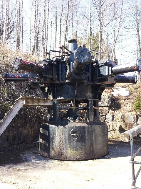 Slipemaskin